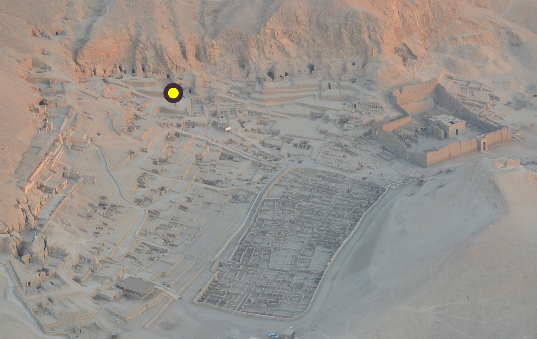 A TT8 Kha sírja Dejr-el-Medinében (Luxor, Egyiptom)